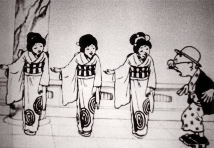 『ノンキなトウサン竜宮参り（夢の浦島）』 （1925/10分/35mm）監督：木村白山